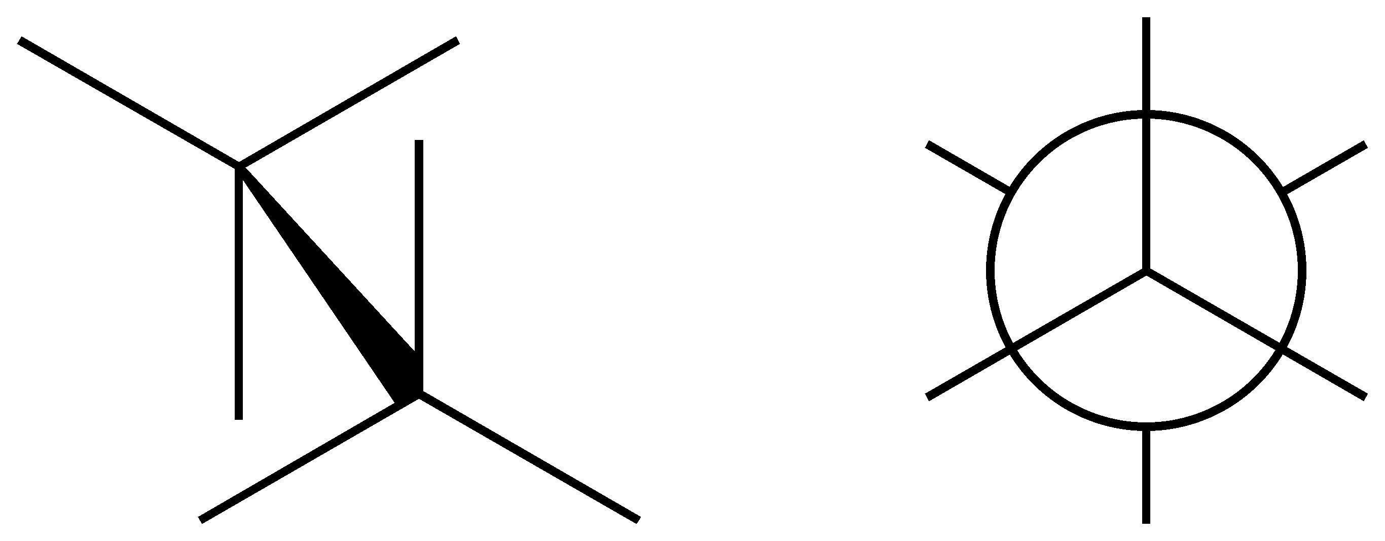 Staggered conformer